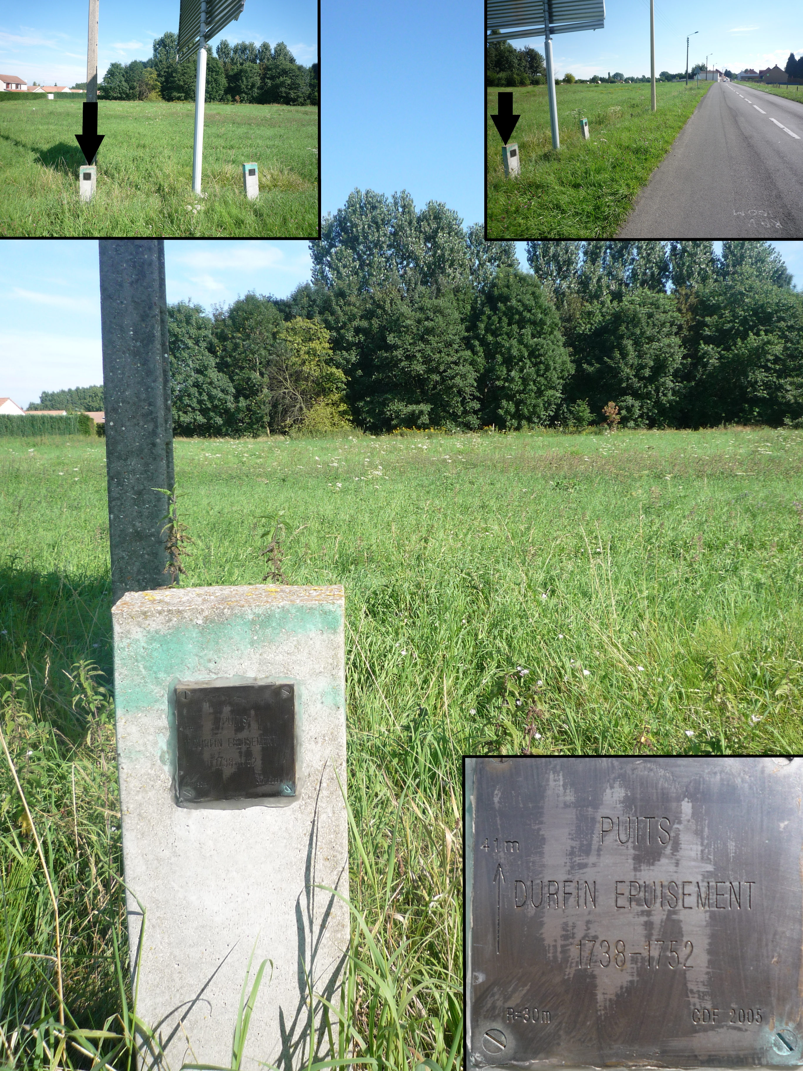 Puits Durfin Épuisement de la Compagnie des mines d'Anzin à Fresnes-sur-Escaut, Nord, Nord-Pas-de-Calais, France.